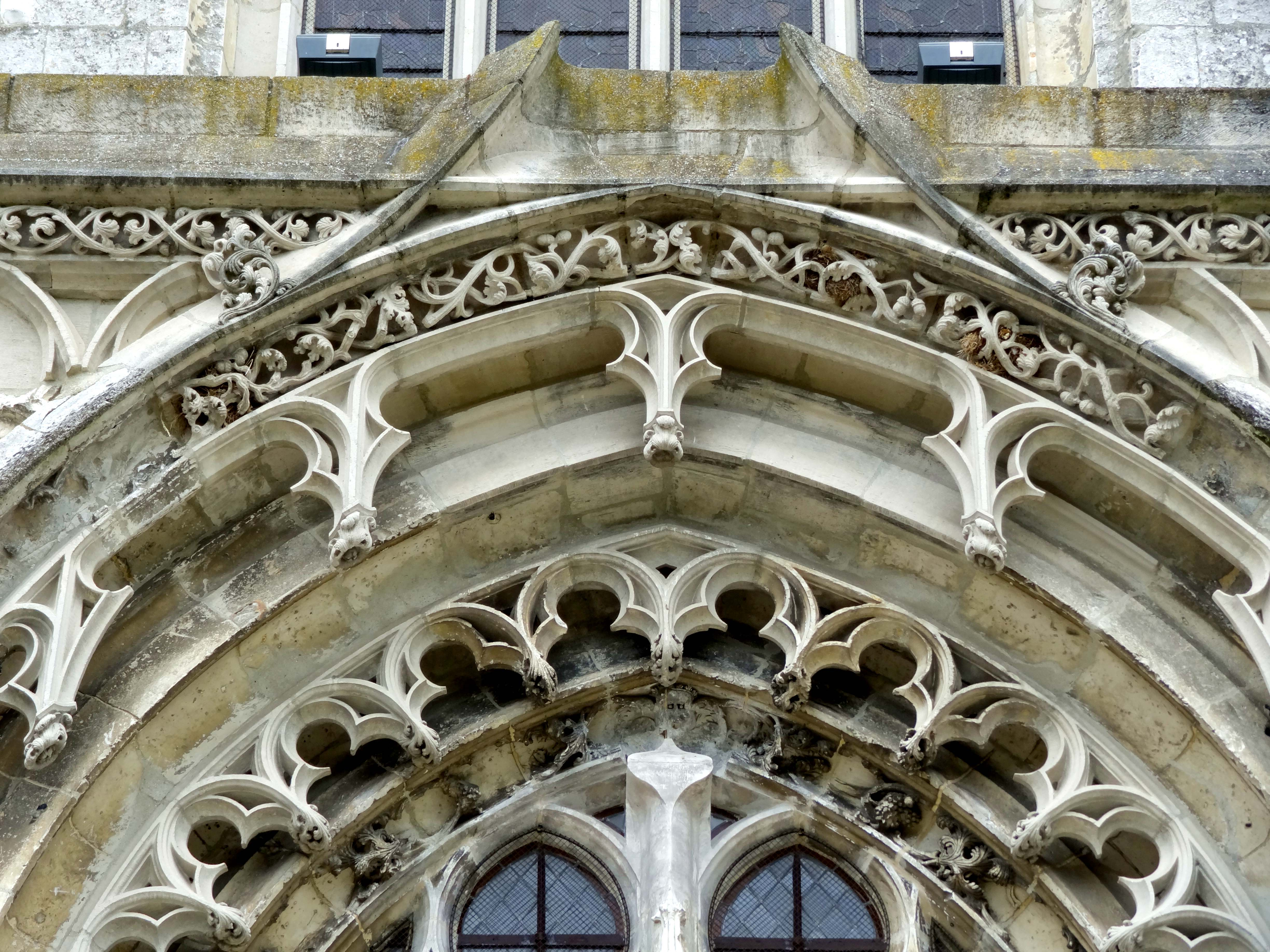 Église Notre-Dame de Marissel - voir titre.